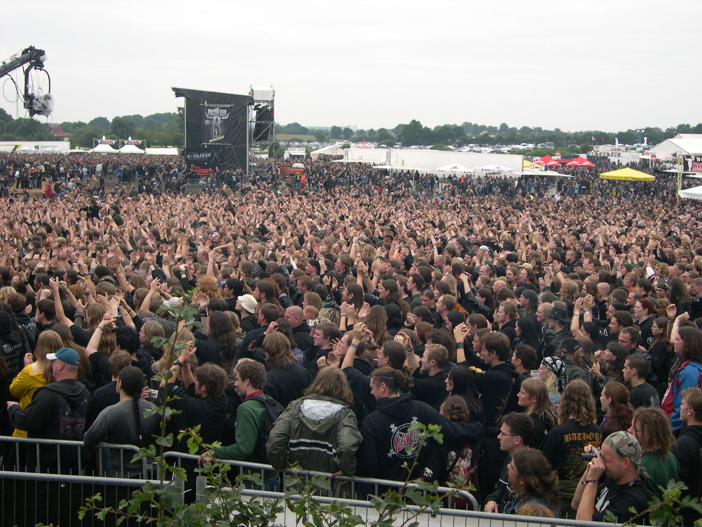 A picture from the German metal festival Wacken Open Air, 2005